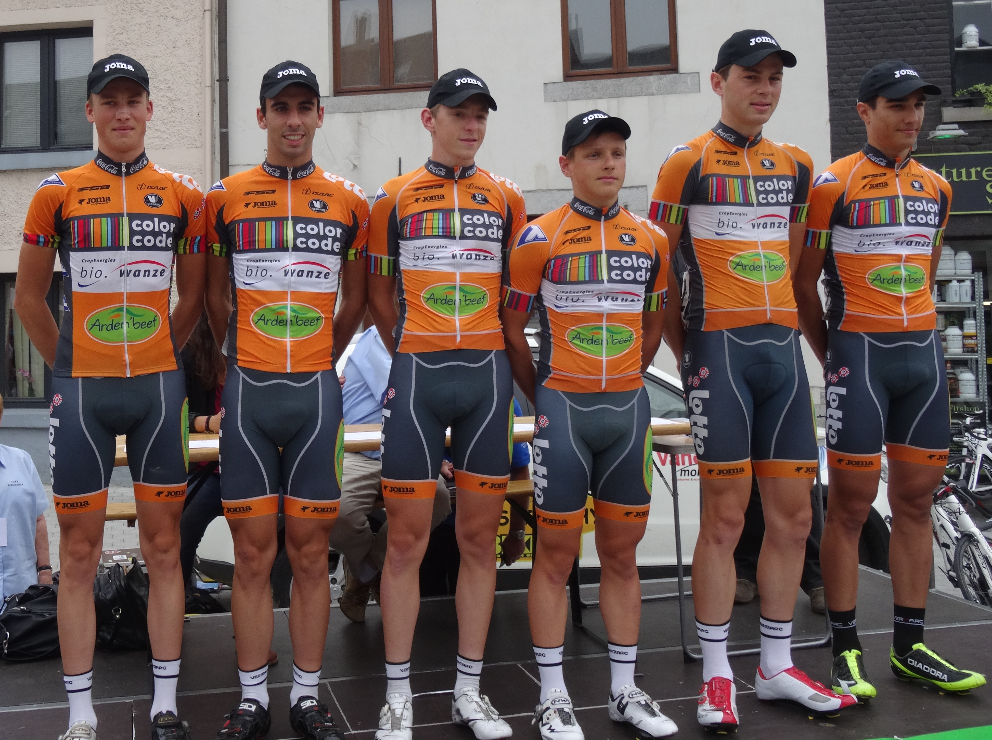 Reportage photographique réalisé le mercredi 6 août à l'occasion du départ de la première étape du Tour de la province de Namur 2014 à Jambes (Namur), Belgique.